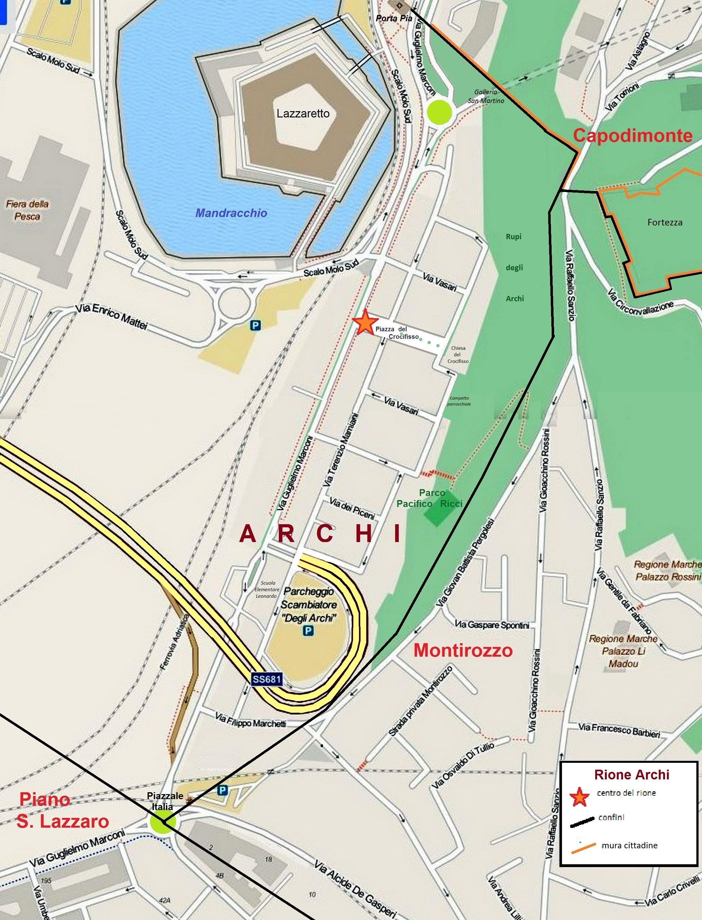 Mappa del Rione Archi di Ancona, con i confini, le vie, le piazze e i parchi.